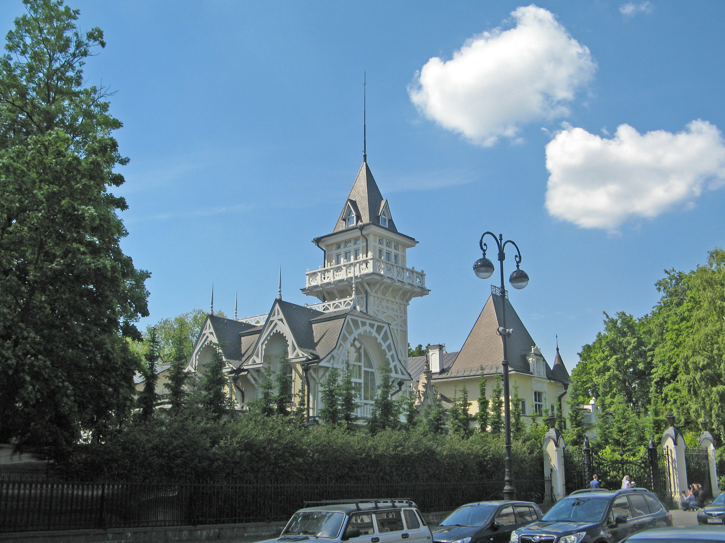 Усадьба М. Э. Клейнмихель: набережная р. Крестовки, 8, 12, Петроградский район, Санкт-Петербург